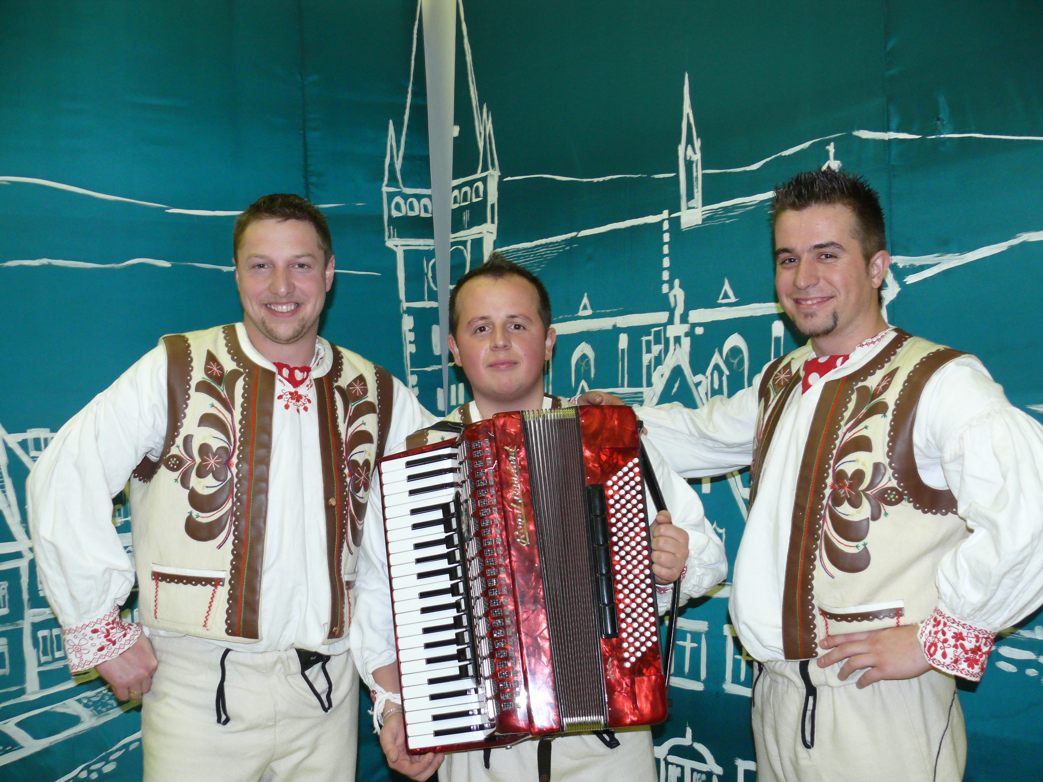 учасники фестивалю